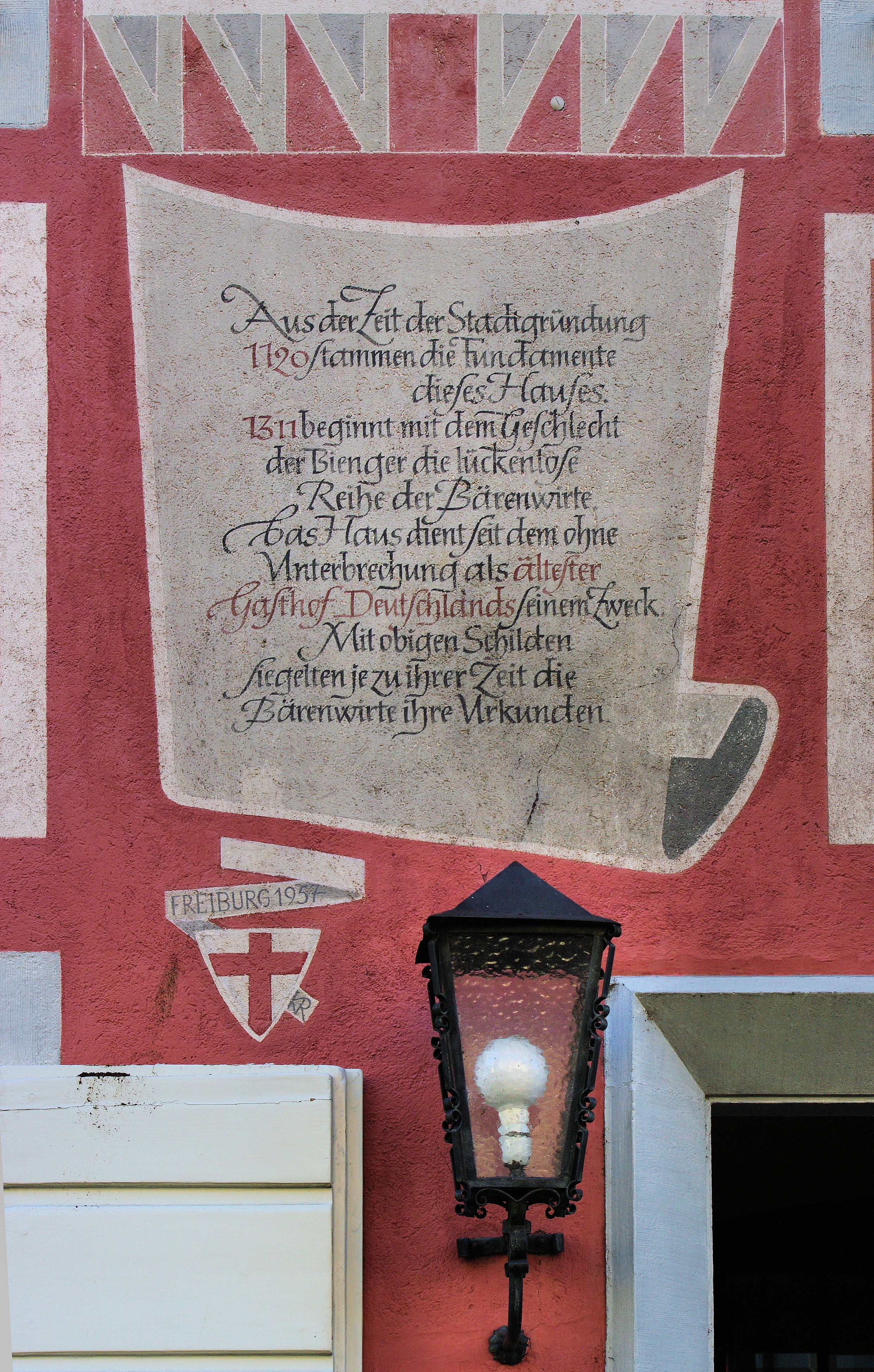 Hotel zum Bären Tafel mit der Geschichte